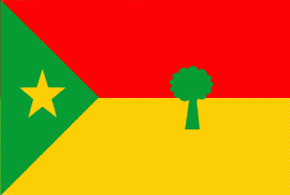 Bandera del Oromo Peoples Democratic Organization Imagen realizada por J. Ollé Véase también: Wikipedia:Autorizaciones/Banderas de Jaume Ollé Categoría:Banderas (imagen) Categoría:Banderas (imagen)